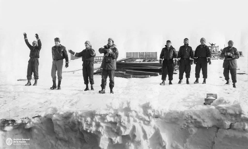 Científicos y marinos argentinos despiden al rompehielos Edisto en la Estación Científica Ellsworth, cedida por los Estados Unidos a la Argentina en 1959, mismo año en que fue tomada dicha fotografía. AGN_DDF_CyC/ Caja 59, inv: 862248.